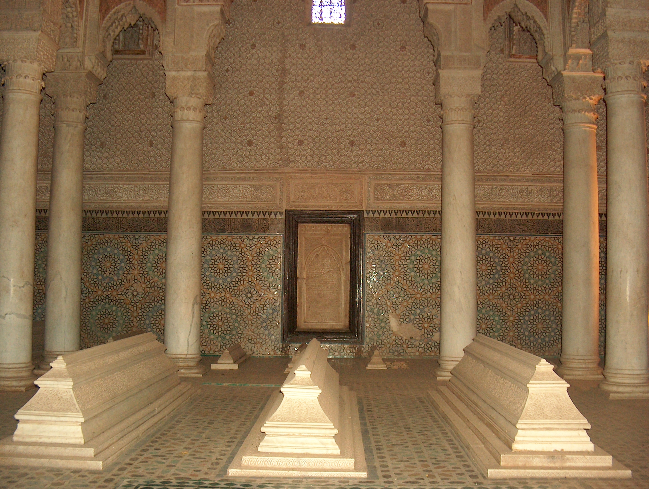 Saadian Tombs